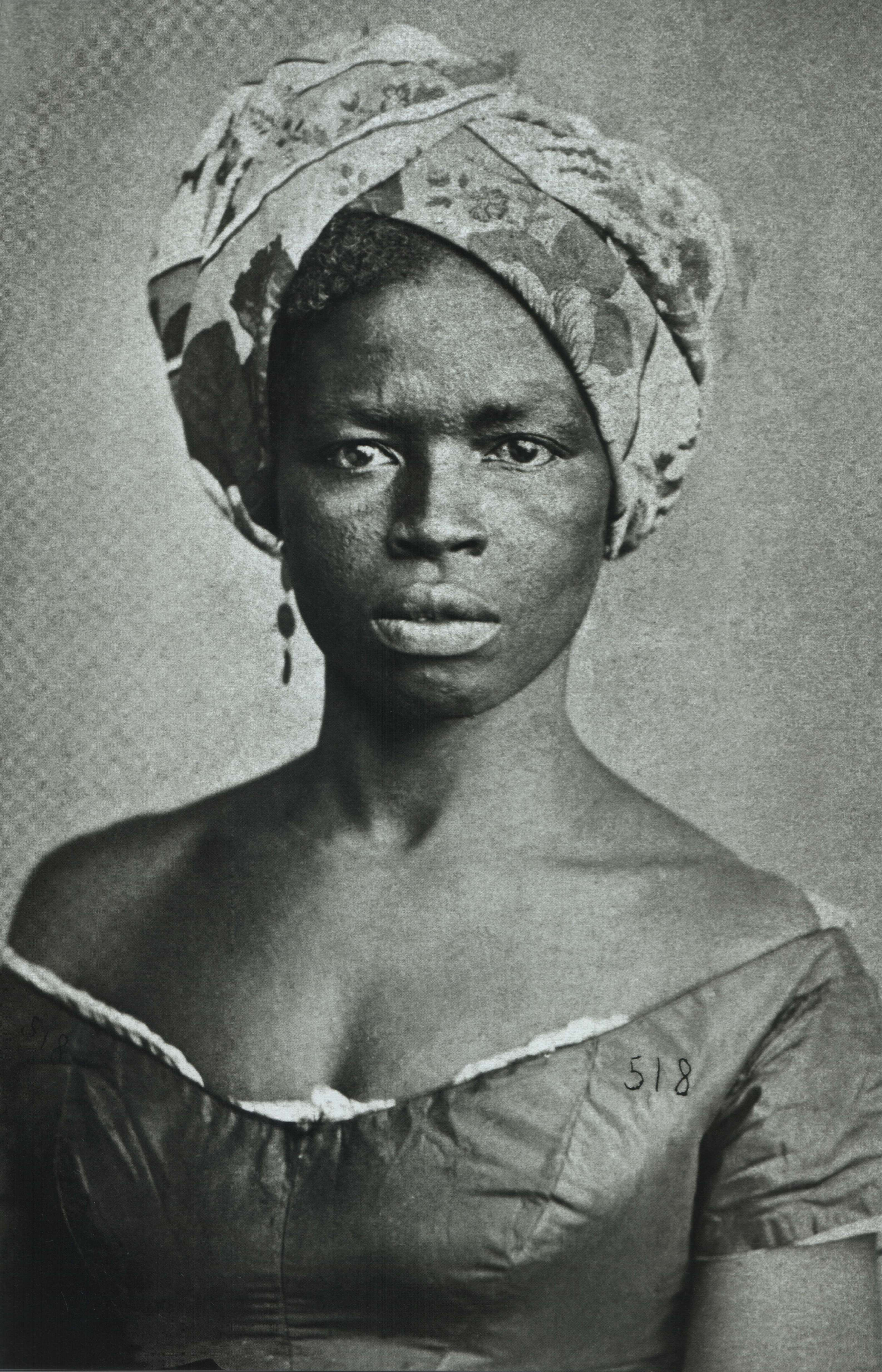 Foto de negra com turbante.